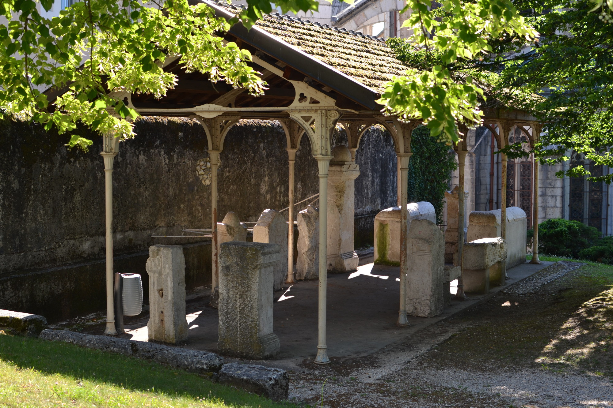 A belley, dans le parc Jean-Pierre Camus aussi appelé jardin de l'évêché, un ensemble de pierre gallo-romaines ː cippes, stèles, sarcophage portant des inscriptions, avec d'autres fragments anépigraphes d'un enclos funéraire, abrités par des colonnes en fonte et une charpente métallique récupérés à la caserne Sibuet. Deux vestiges proviennent de l'ancienne collection Lépaulle, neuf ont été trouvés dans le lit du Rhône à Anglefort.